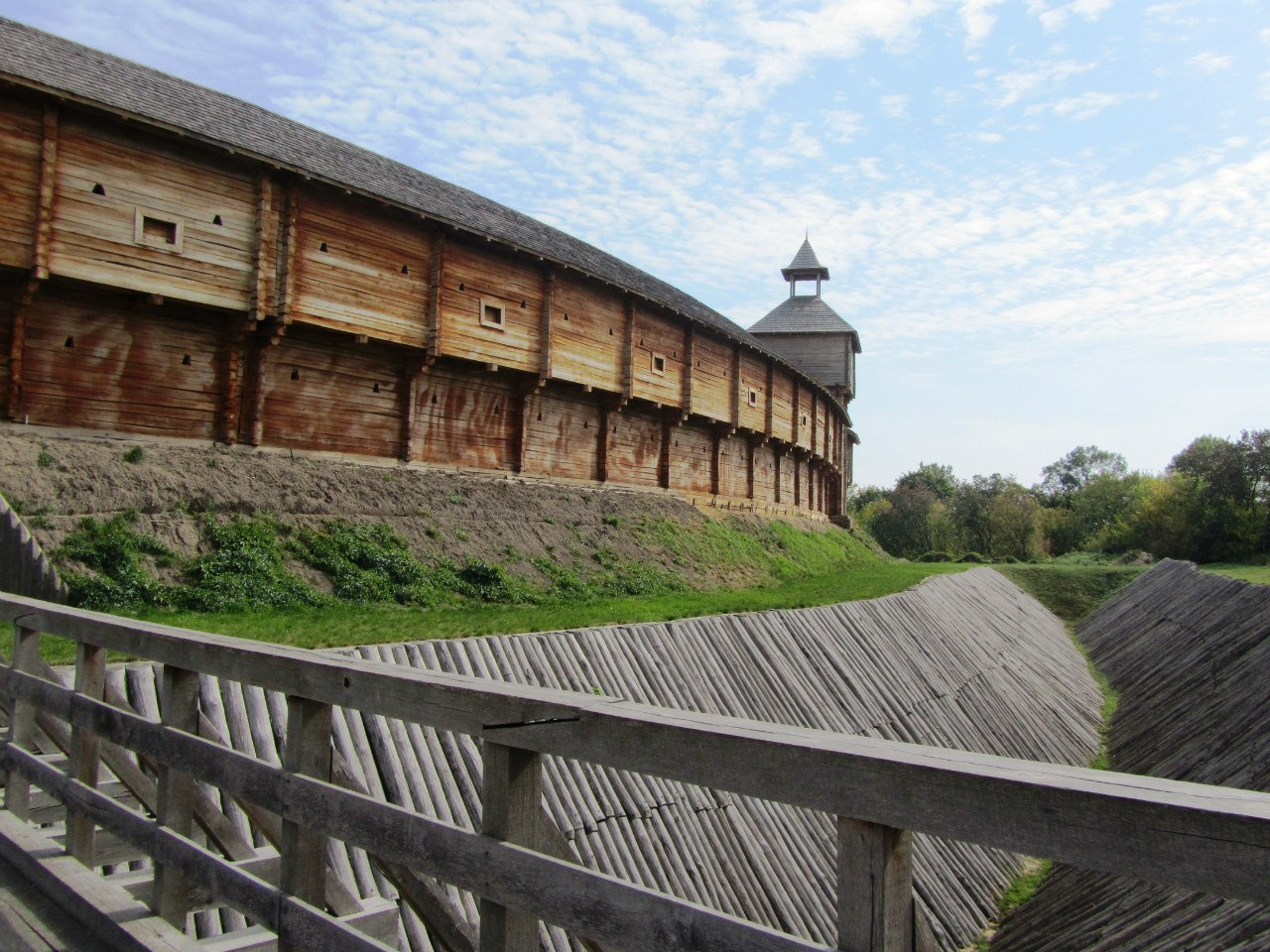 Поселення укріплене багатошарове «Батуринська фортеця», Батурин, між вулицями Партизанська, Петровського, Радянської та провулками Партизанськім і Петровського